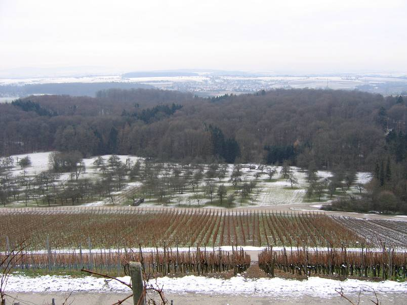 Winterlicher Ausblick vom Lemberg bei Affalterbach, Württemberg